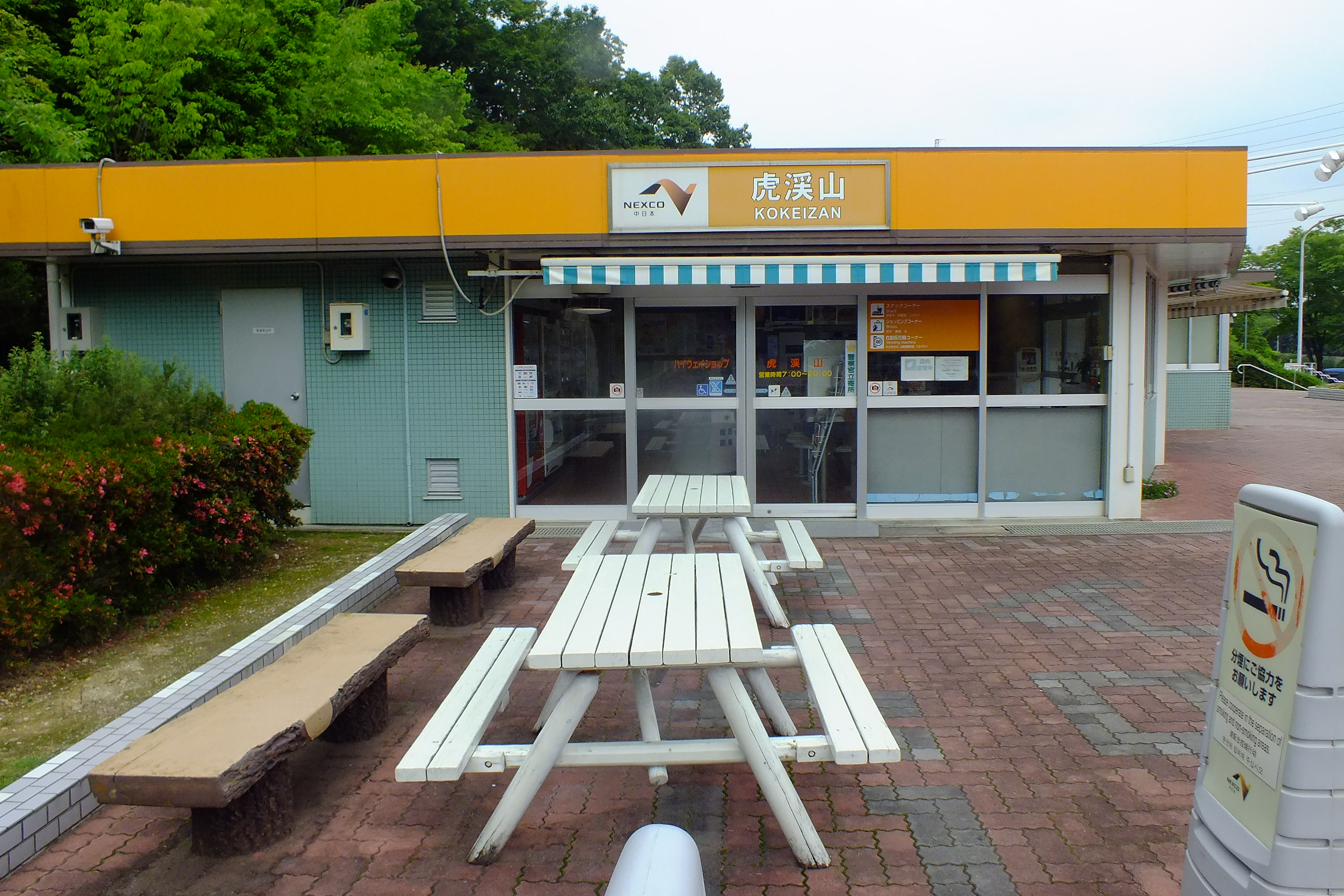 2017-06-29 Kokeizan-PA(虎渓山パーキングエリア)